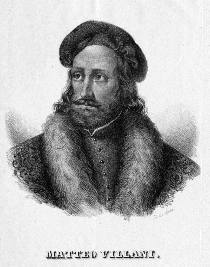 Villani, Matteo (um 1292 - 1363)